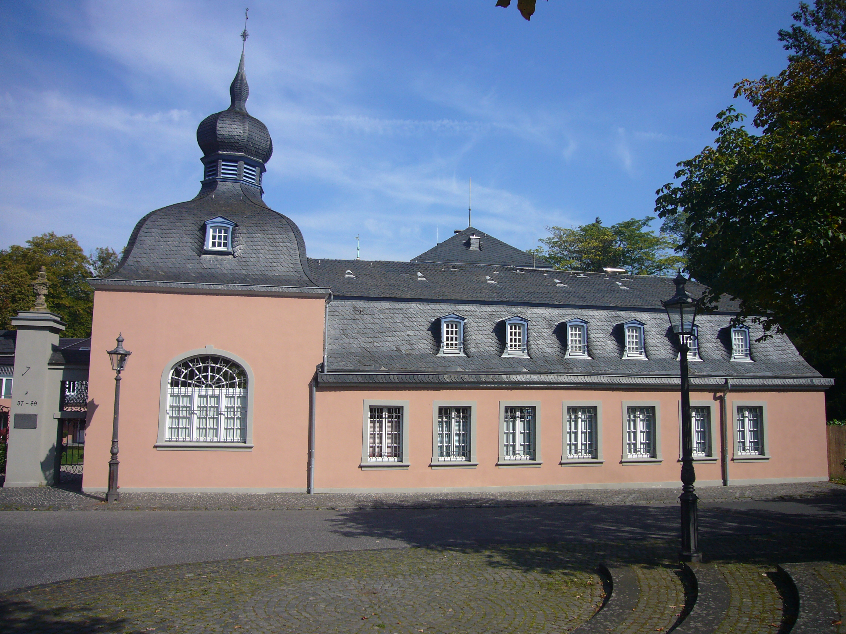 Die Deutschherren-Kommende in Muffendorf, Bonn-Bad Godesberg